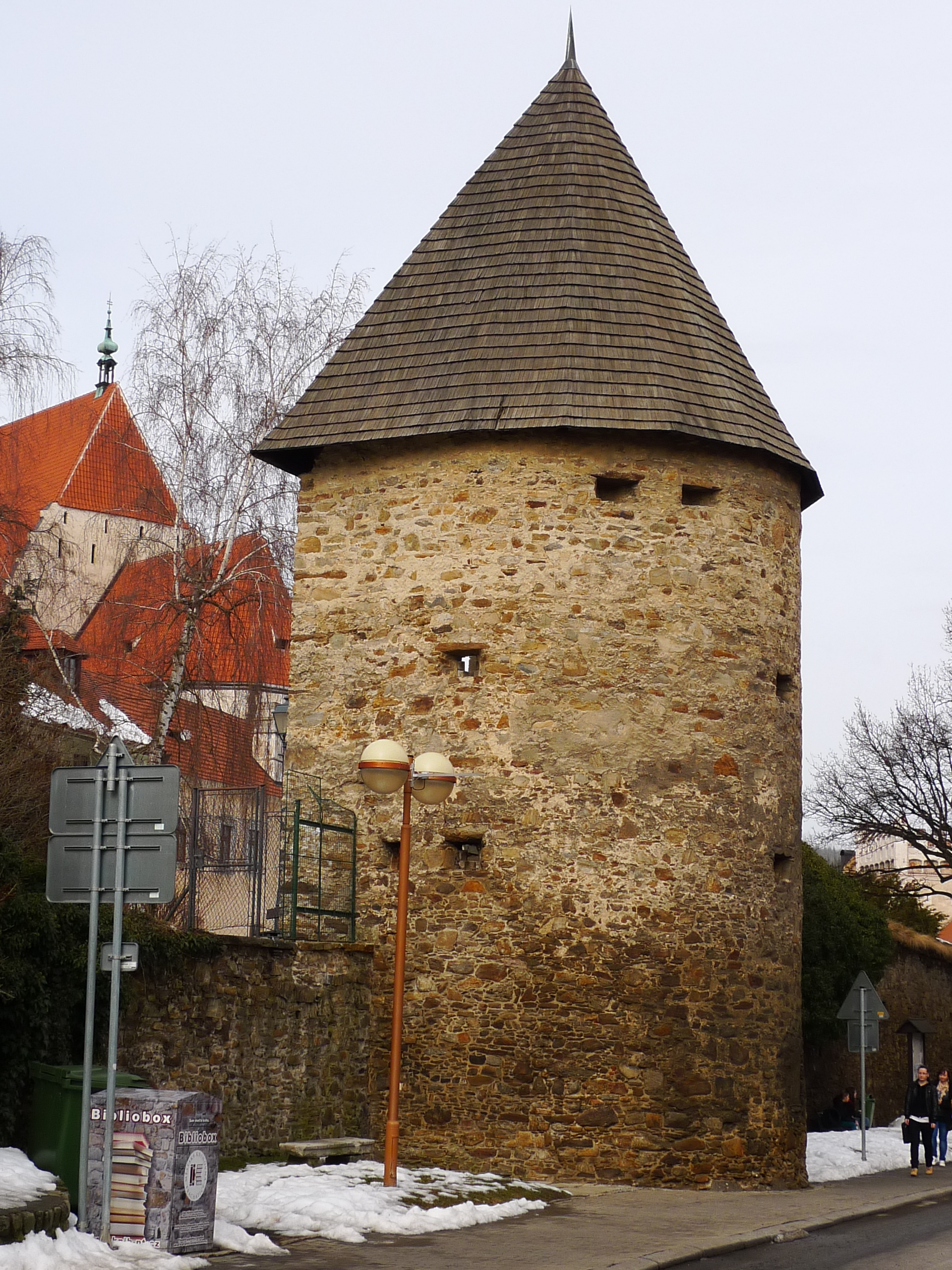 Městské opevnění - Písecká brána, bašty, parkánová a hradební zeď (Prachatice), kolem historického jádra města, Prachatice